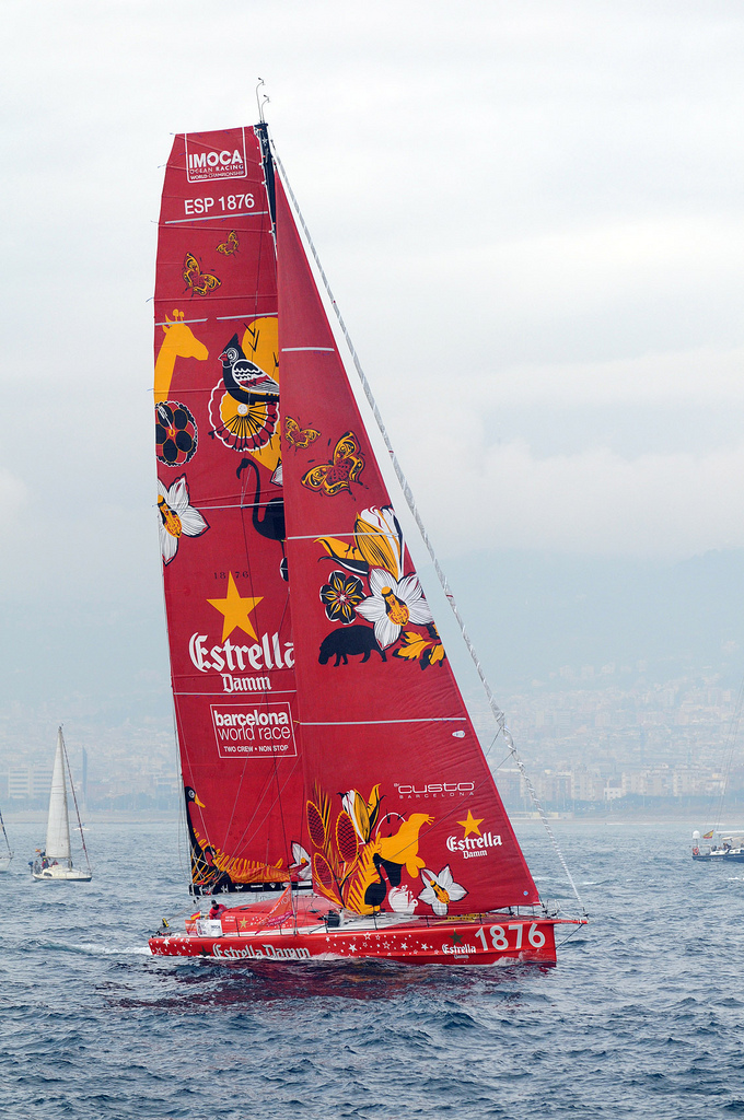 Velero Estrella Damm Sailing Team